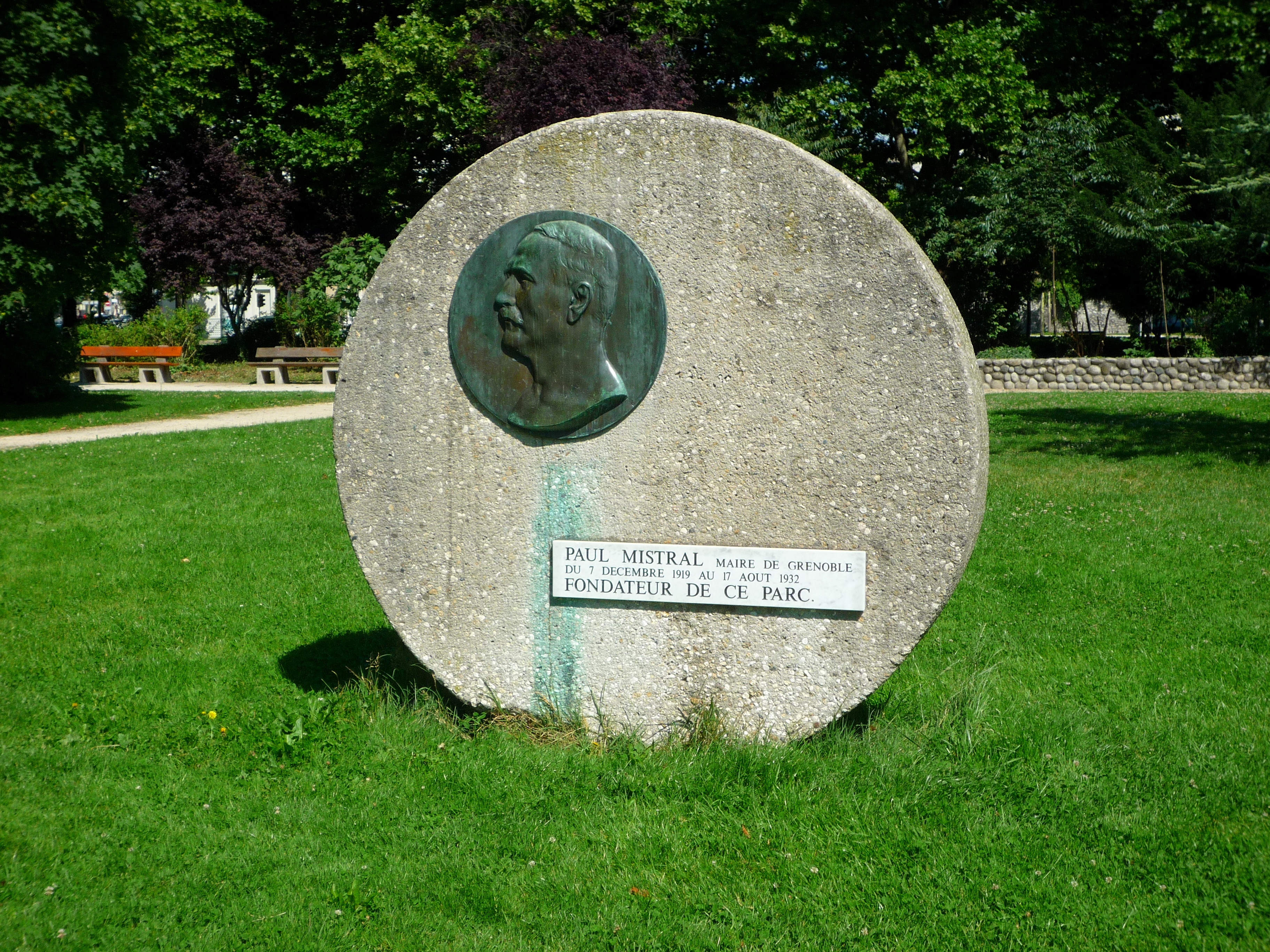 Stèle Mistral (1874-1932) ; Grenoble